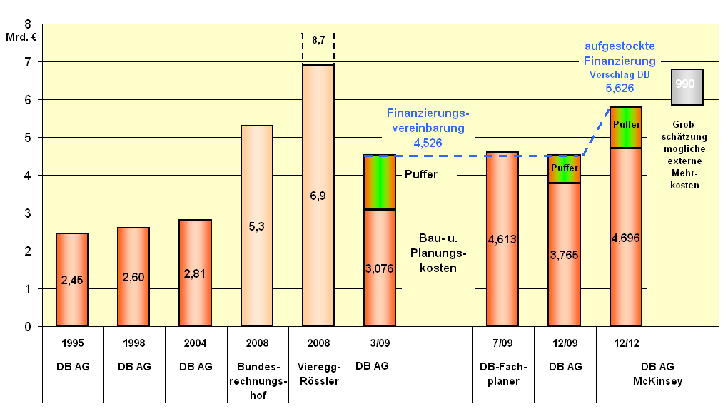 Kostenschätzungen und Kostenberechnungen für das Projekt "Stuttgart 21", Stand: Dez. 2012